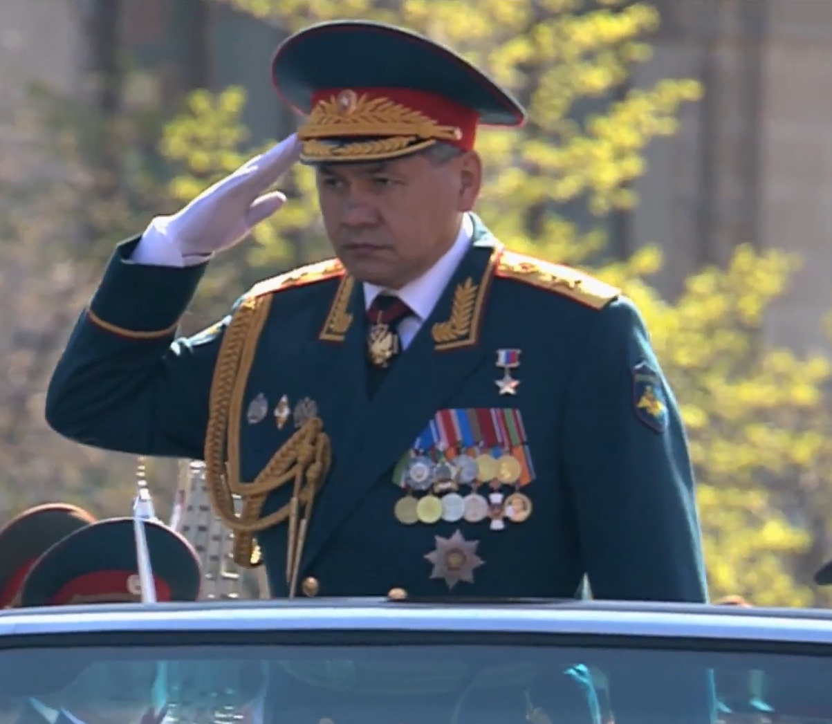 Сергей Шойгу в парадной форме генерала армии на параде 9 мая 2013